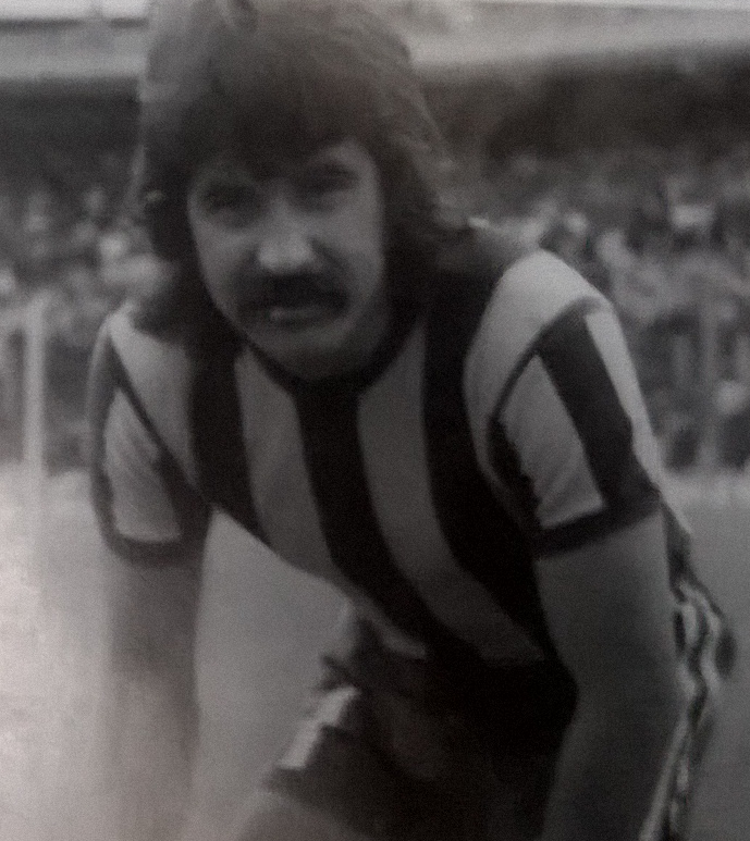 Ignacio Ramón Peña, futbolista de Rosario Central en el año 1976.